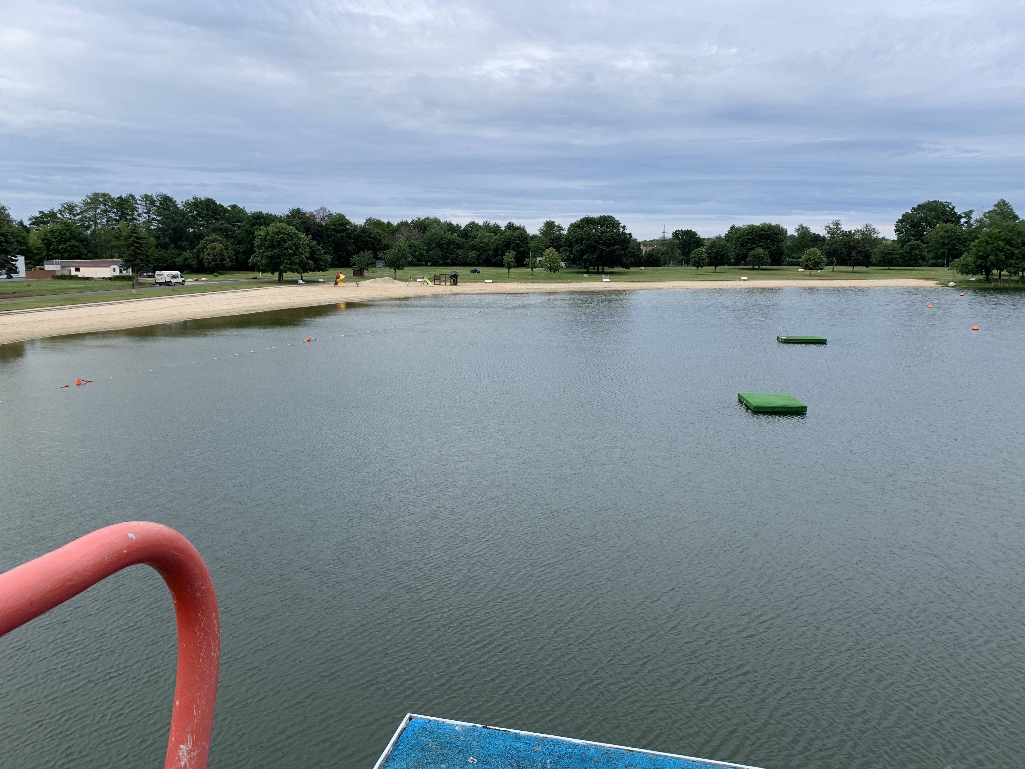 Ausblick vom Sprungturm auf 2 schwimmende Plattformen und den leeren Strand